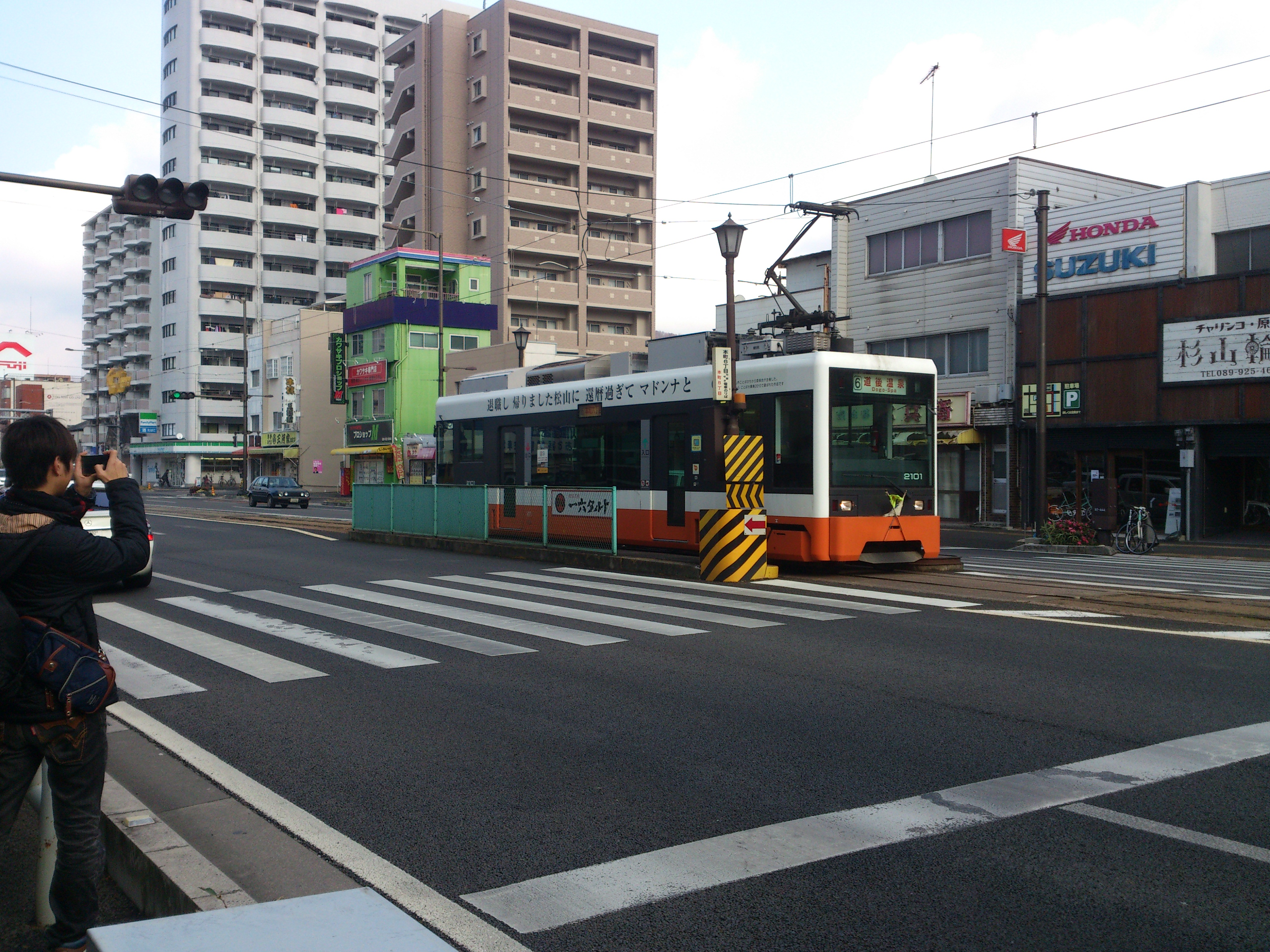 本町五丁目電停